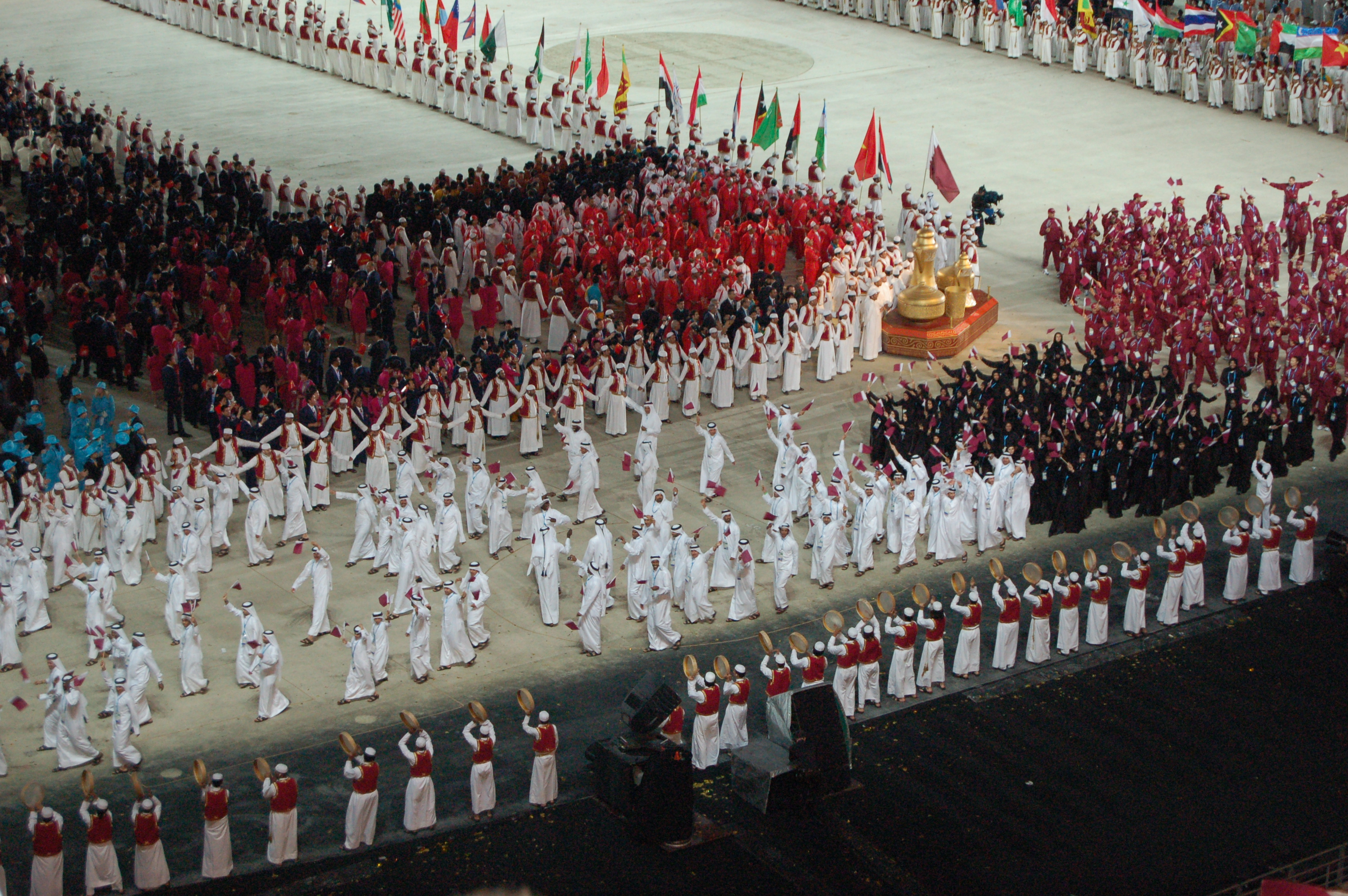 2006年亞洲運動會。